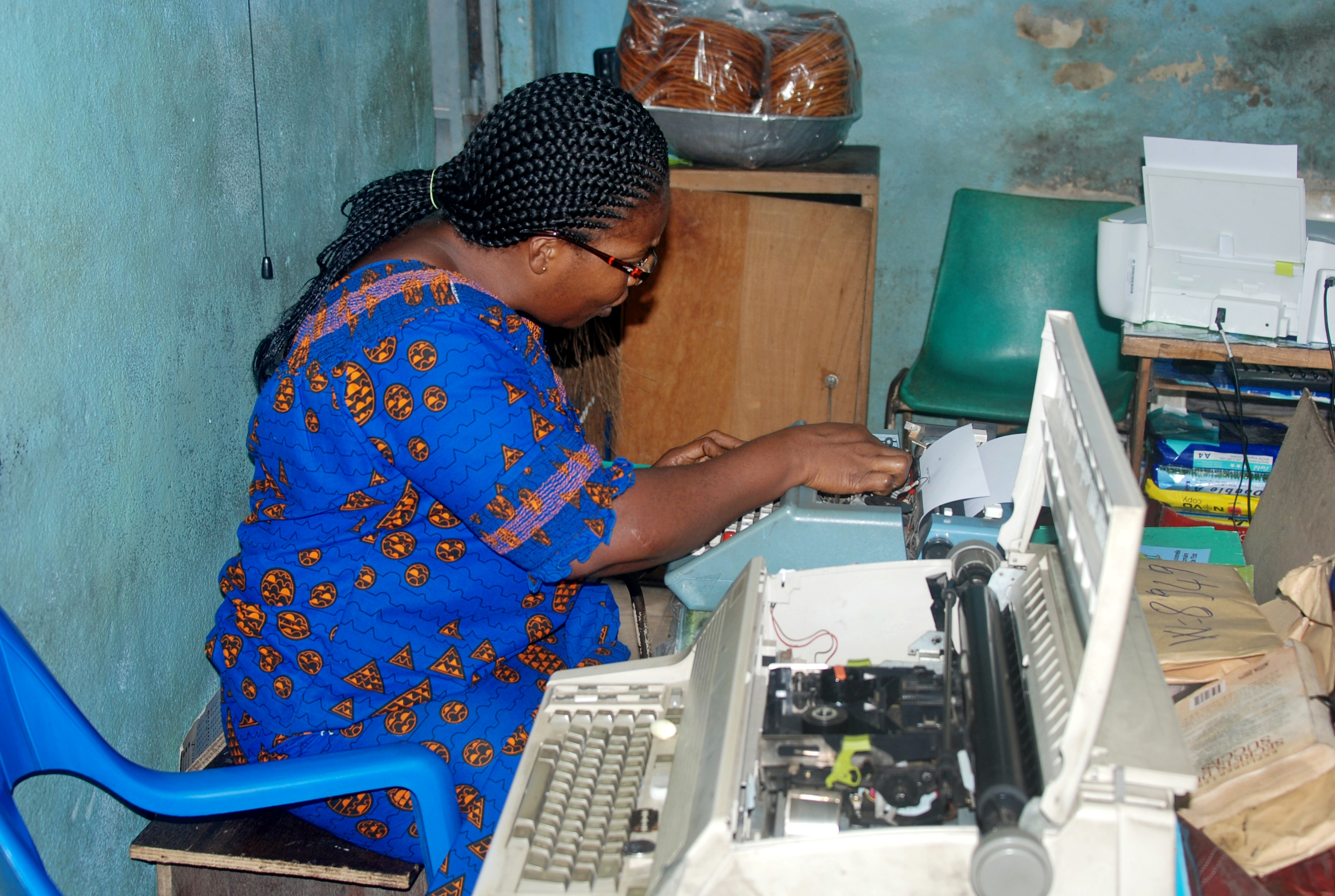 Une femme dactylographe à Abidjan, précisément dans la commune du Plateau. This is an image of "African people at work" from Ivory Coast